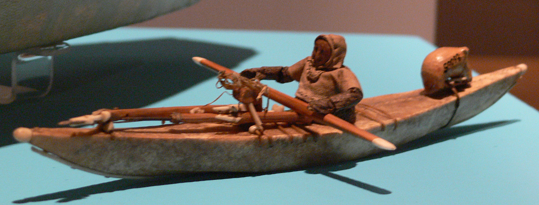 Stuttgart, Linden-Museum Kajak-Modell mit Figur und Jagdausrüstung, Westgrönland um 1900, Holz mit Robbenleder überzogen, Inv. Nr. 086065